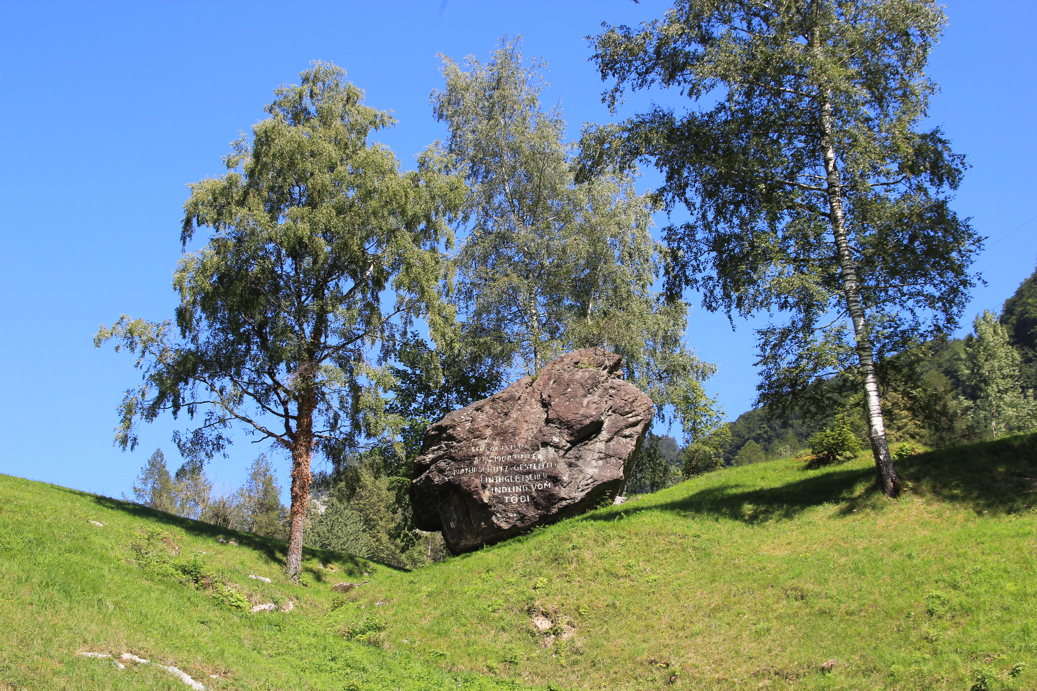 Schlattstein